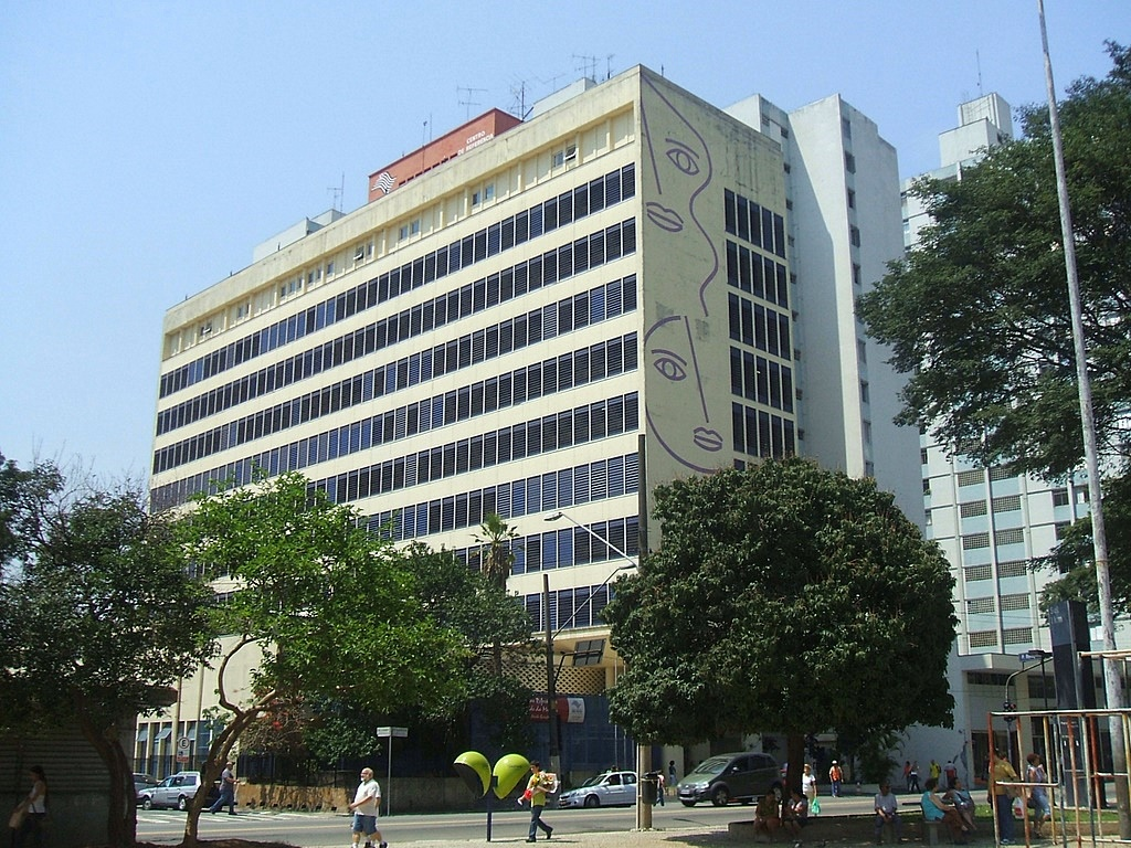 Hospital Pérola Byington - Centro de Referência da Saúde da Mulher - na Avenida Brigadeiro Luís Antônio, em São Paulo, Brasil